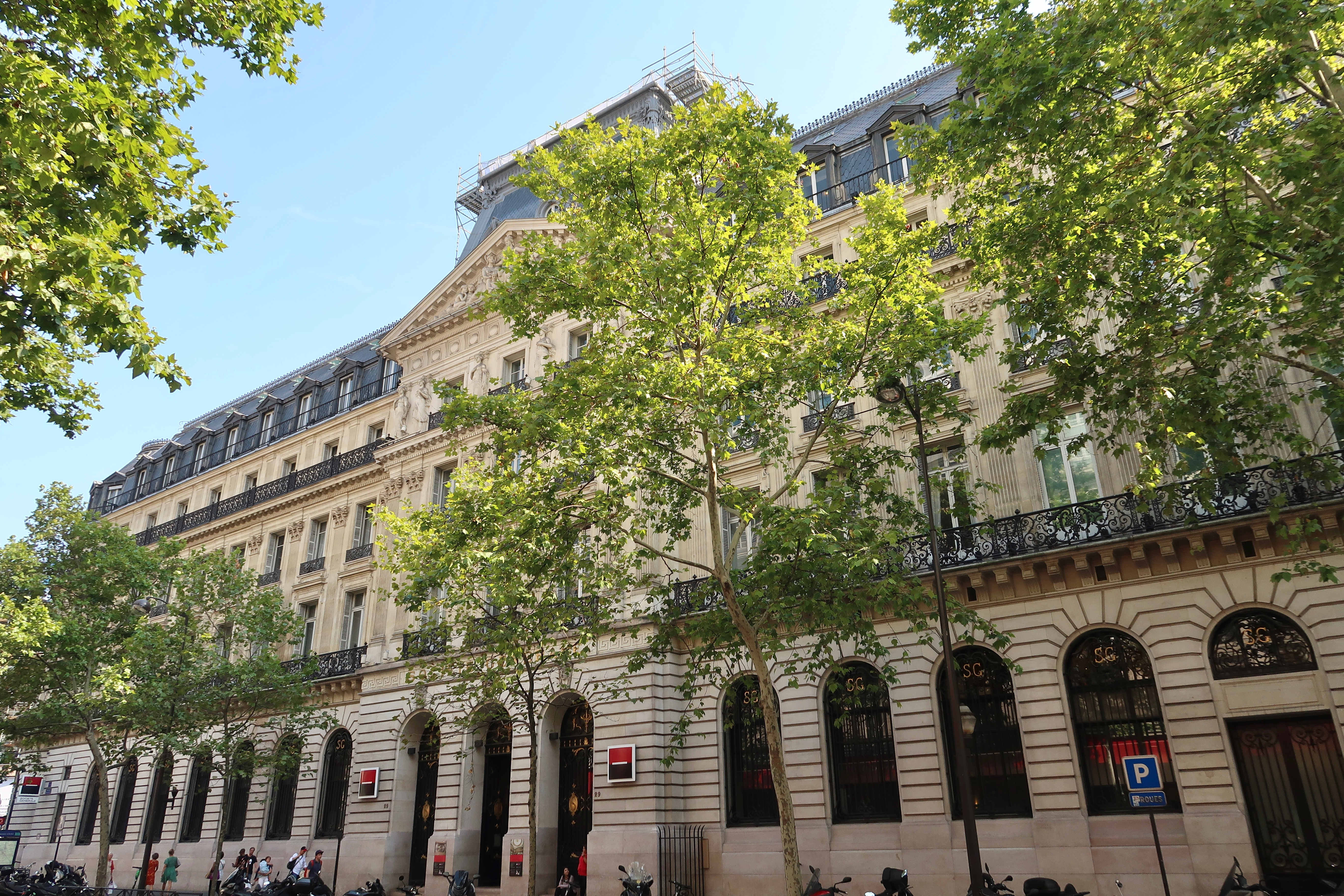 Société Générale, 29 boulevard Haussmann (Paris, 9e).